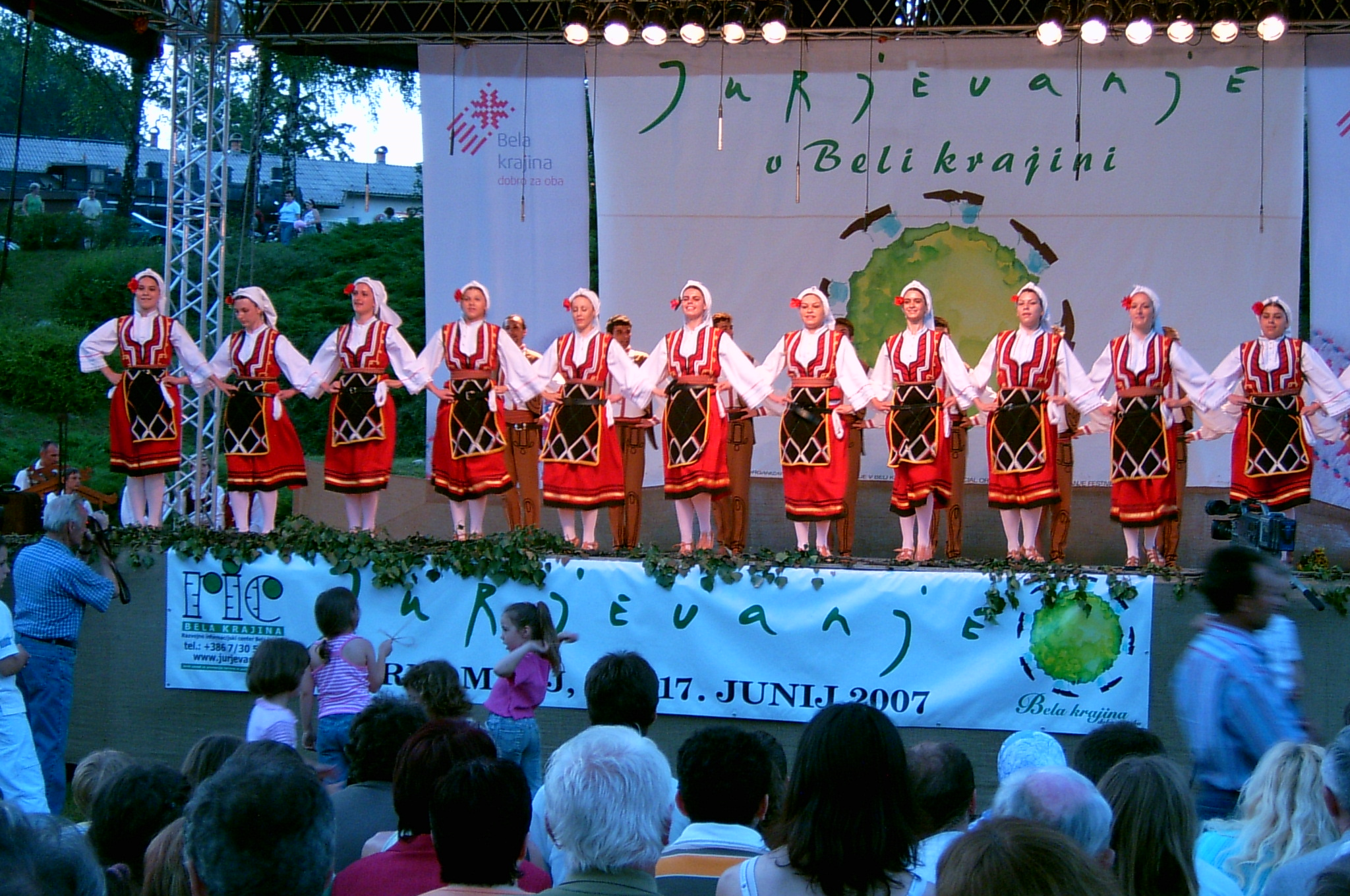 Folklorni ansambl Bitola.